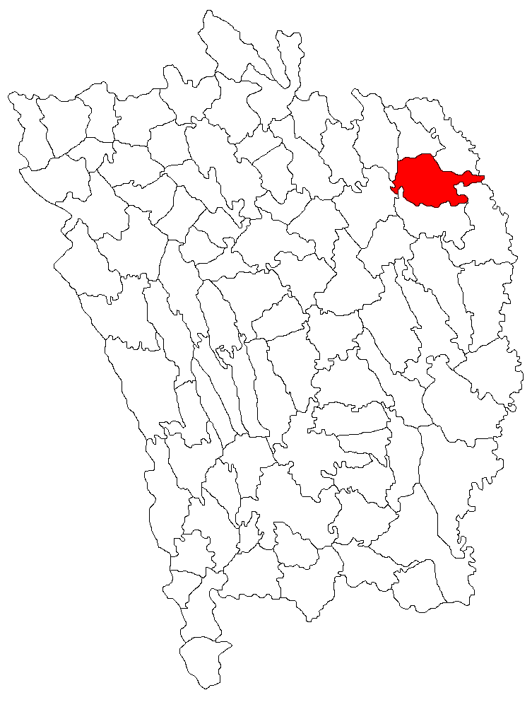 Categorie:Hărţi ale judeţului Vaslui